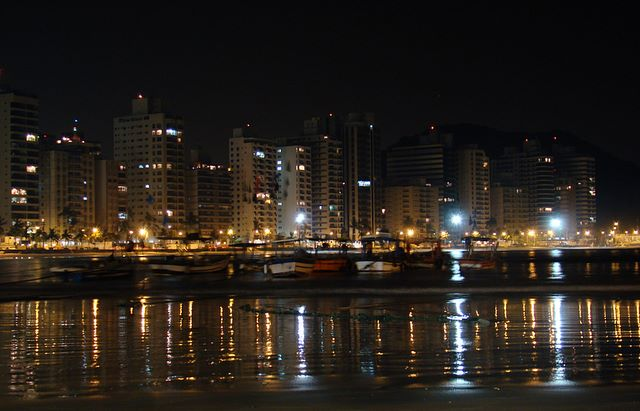 Praia do Guarujá a noite, São Paulo. Vista da praia das Astúrias (praia do Guarujá), com vista parcial da praia das Pitangueiras ao fundo.